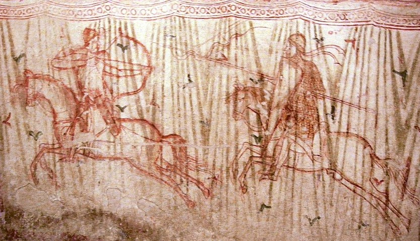 Fresco of Knight and exotic Warrior